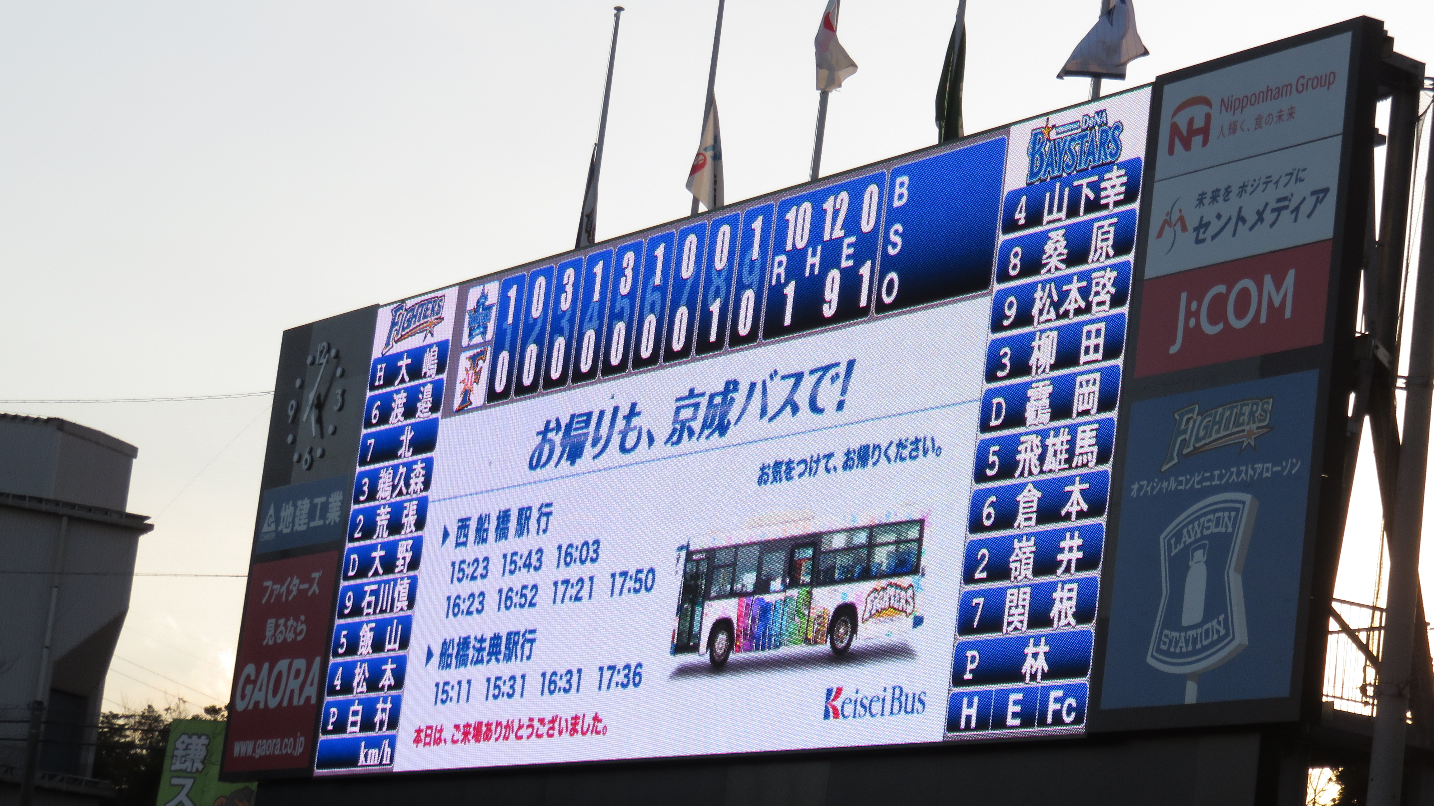 鎌ヶ谷スタジアムのフルビジョンスコアボード